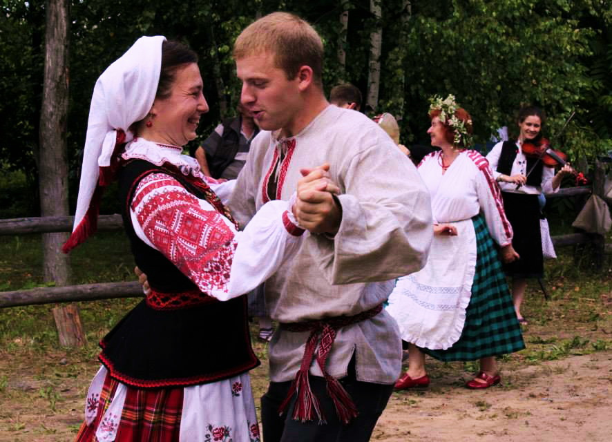 Беларуская (тарашкевіца): Зялёныя Сьвяткі Магілёў 29.06.2913